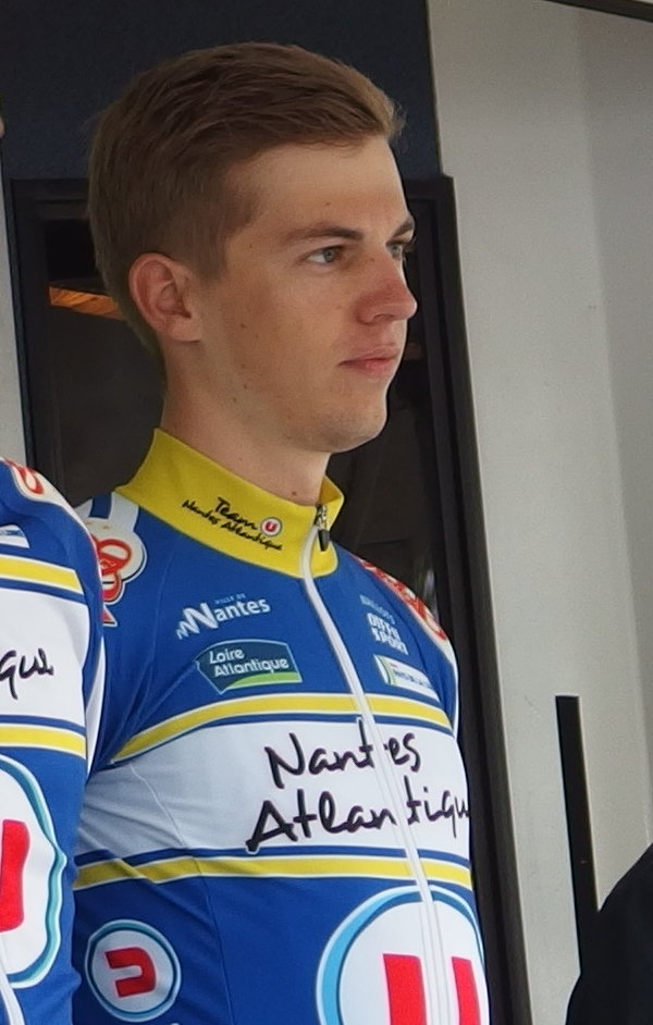 Tour de Bretagne 2015 - Présentation des équipes au départ de la troisième étape à Baud - Équipe UC Nantes Atlantique Depicted person: Till Drobisch